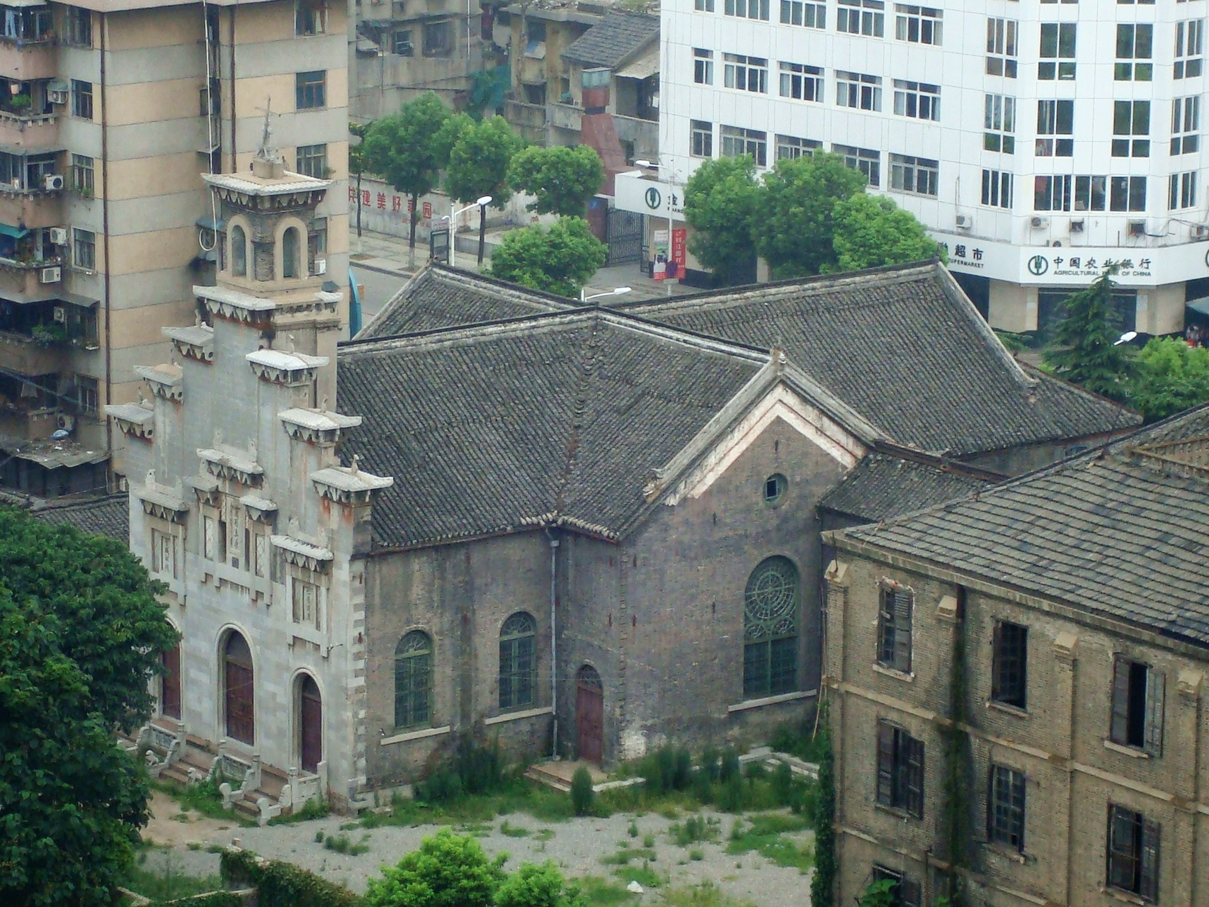 位于安庆市孝肃路与锡麟街交汇处的耶稣圣心主教座堂